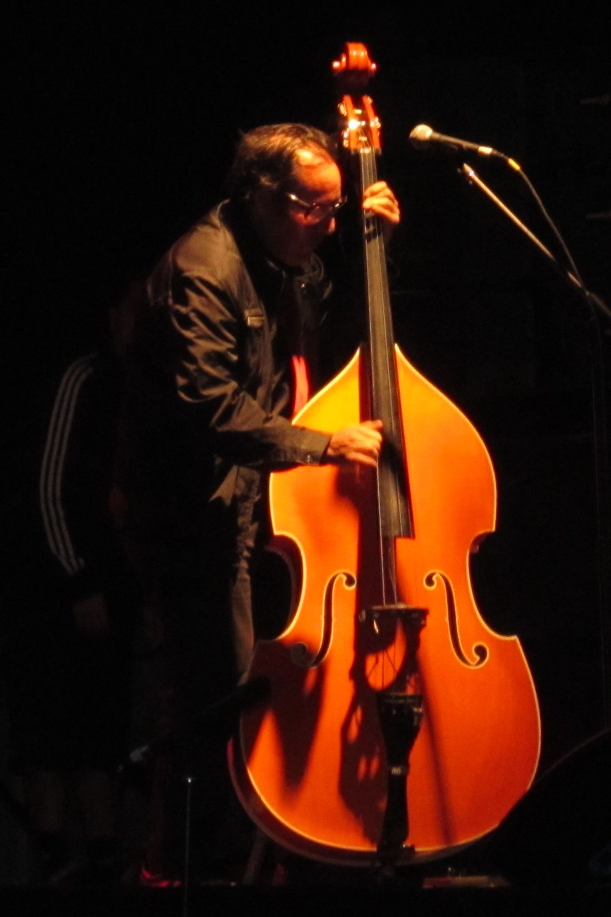 Roberto Lindl durante un concierto de Los Tres, en la comuna de Olivar, Chile, en 2012.